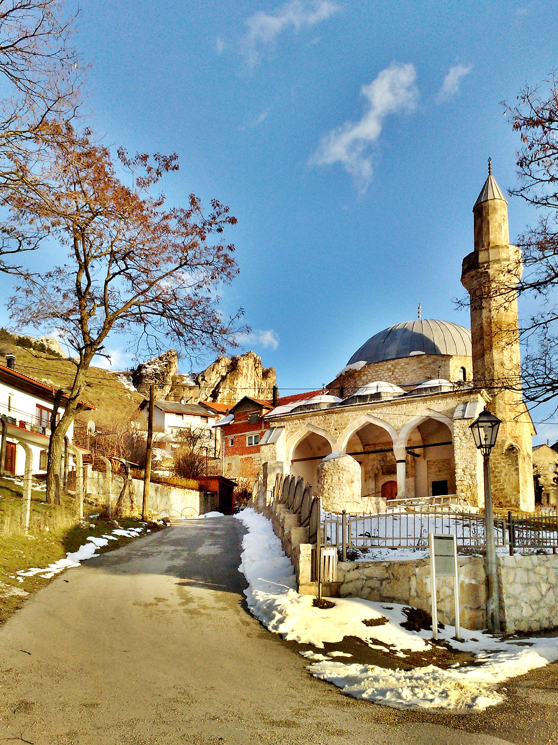 Skoza u Livnu